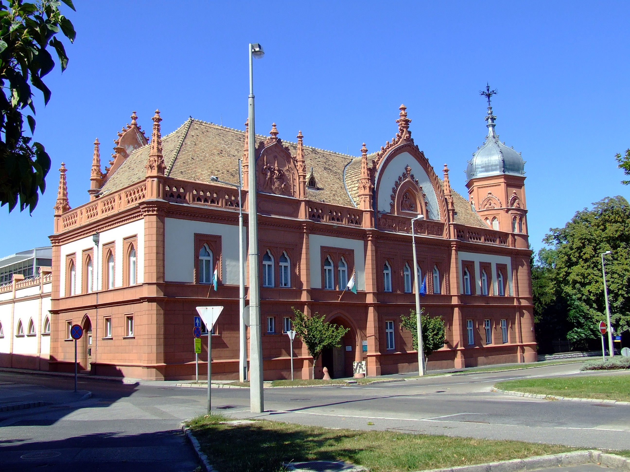 A veszprémi Eötvös Károly Megyei Könyvtár épülete This is a photo of a monument in Hungary. Identifier: 10635